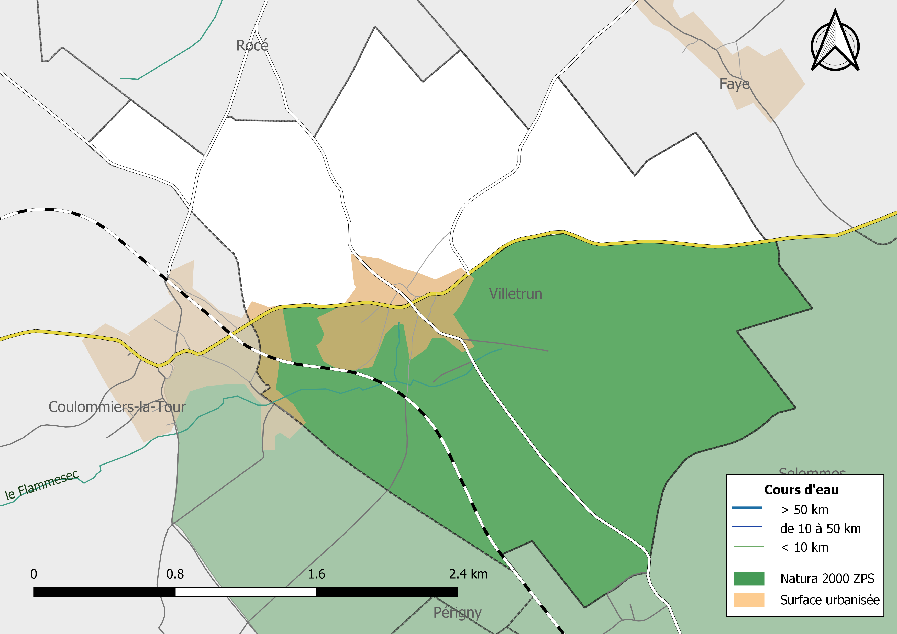 Carte du site Natura 2000 de type ZPS de la commune de Villetrun (France).